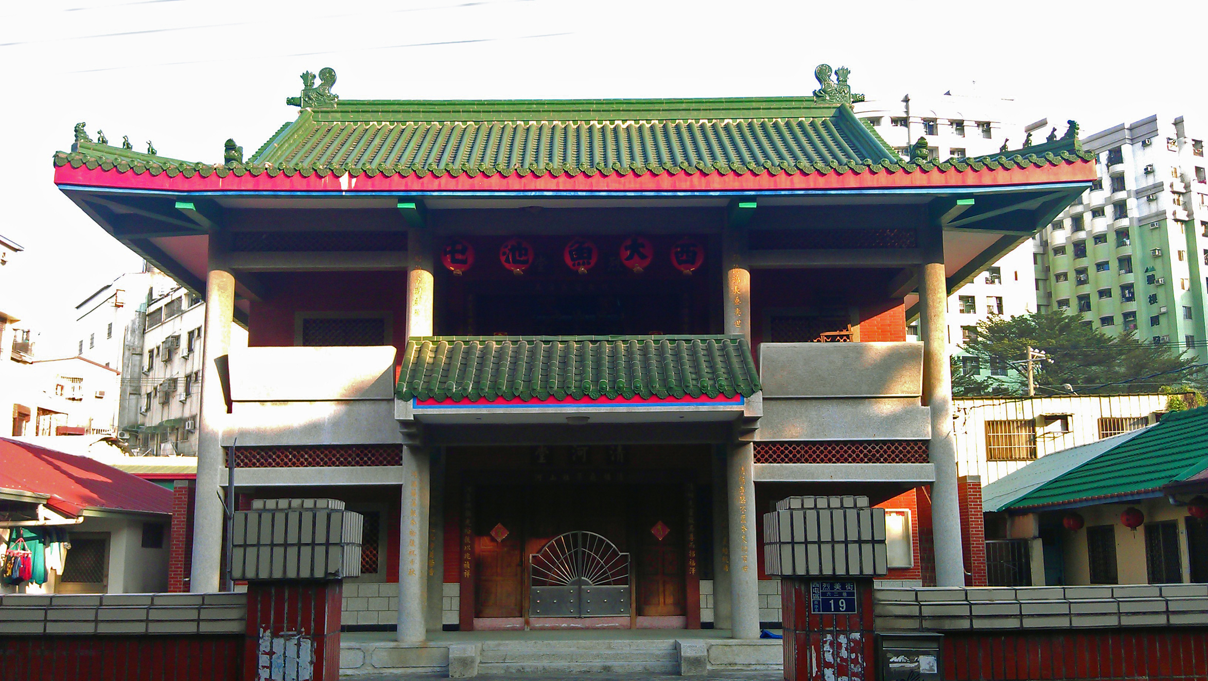 中文（台灣）: 大魚池烈美堂